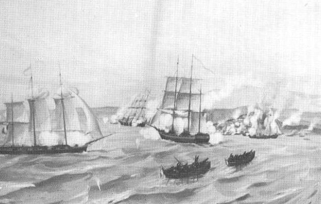 Pintura anónima que representa la batalla de Cruces, cerca al puerto de Guayaquil.